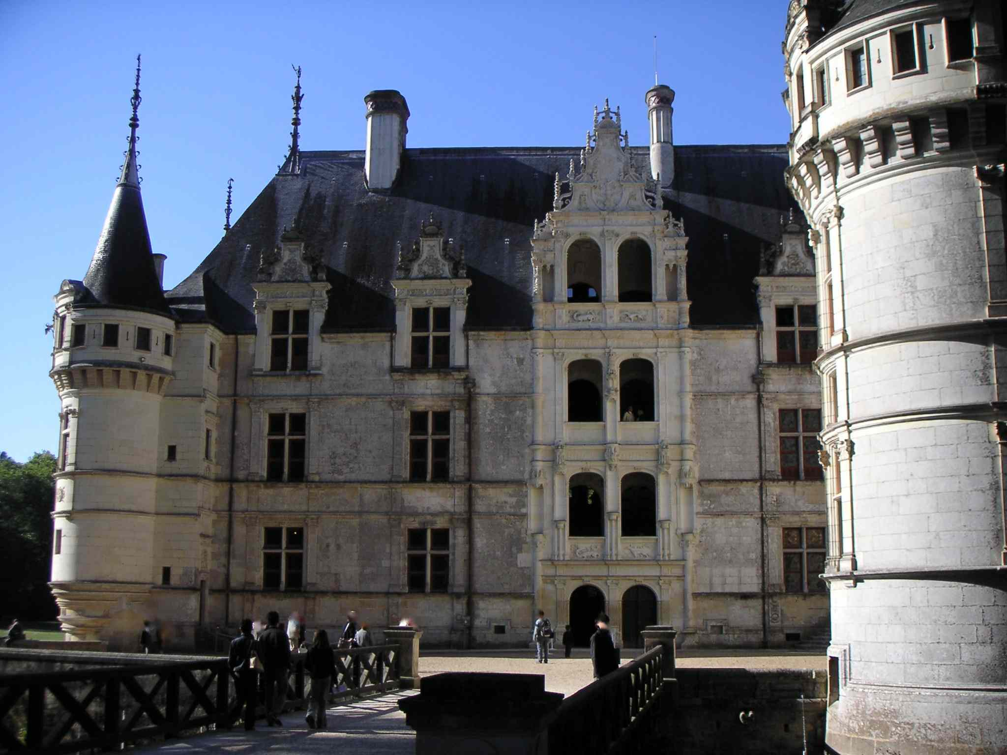 Vue du château d'Azay-le-rideau par le coté de la cour intérieure, prise par mes soins.